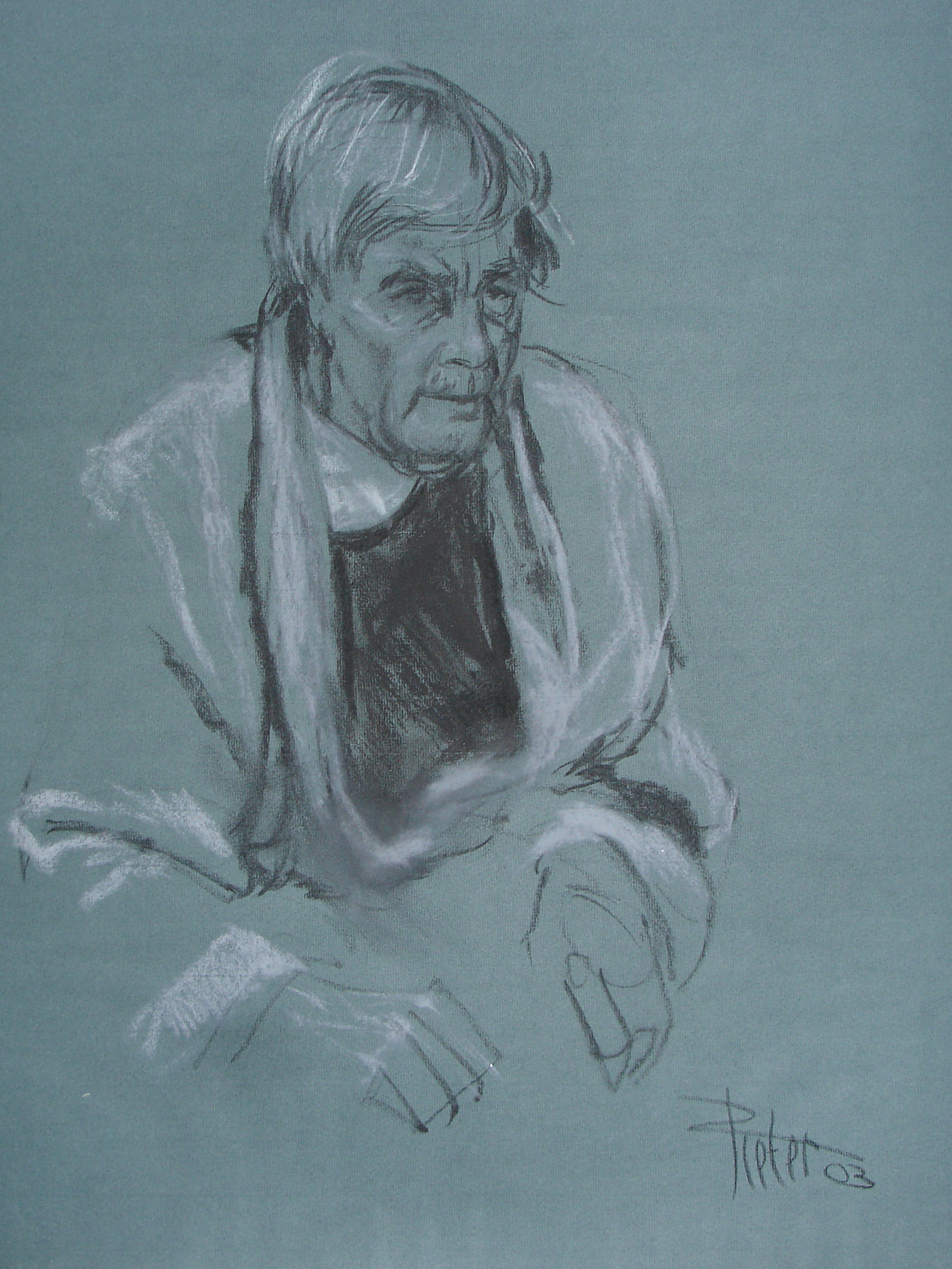 Willem Gerrit van de Hulst jr. ((waarschijnlijk) Utrecht, 4 juni 1917 – Nieuwersluis, 27 juli 2006) was een Nederlands kunstschilder, beeldhouwer, illustrator en kinderboekenschrijver. -- Ik ontmoette Willen pas heel laat in zijn leven maar we konden goed met elkaar opschieten en spraken veel op zijn atelier over kunst. Op een dag heb ik hem gevraagd of ik hem mocht tekenen. Het voorstel was dat ik twee tekeningen zou maken en dat hij er een zou uitkiezen. Deze vond Willem maar niks met dat opgehoogde wit, dus die mocht ik houden. Een paar jaar later overleed Willem. Dan krijgt zo'n portret direct extra waarde. De tekening is (na veel aandringen) momenteel in bezit van Cees Hensbergen, maar het beeldrecht ligt nog bij mij.